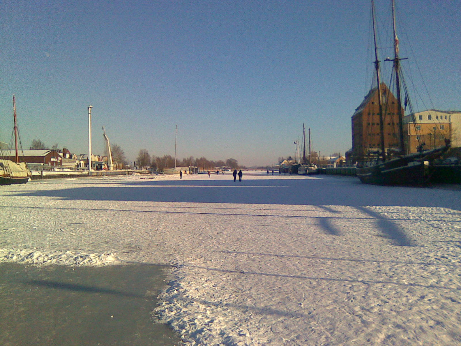 auf dem zugefrorenen Ryck am Museumshafen Greifswald; Blick Richtung Osten/Wieck